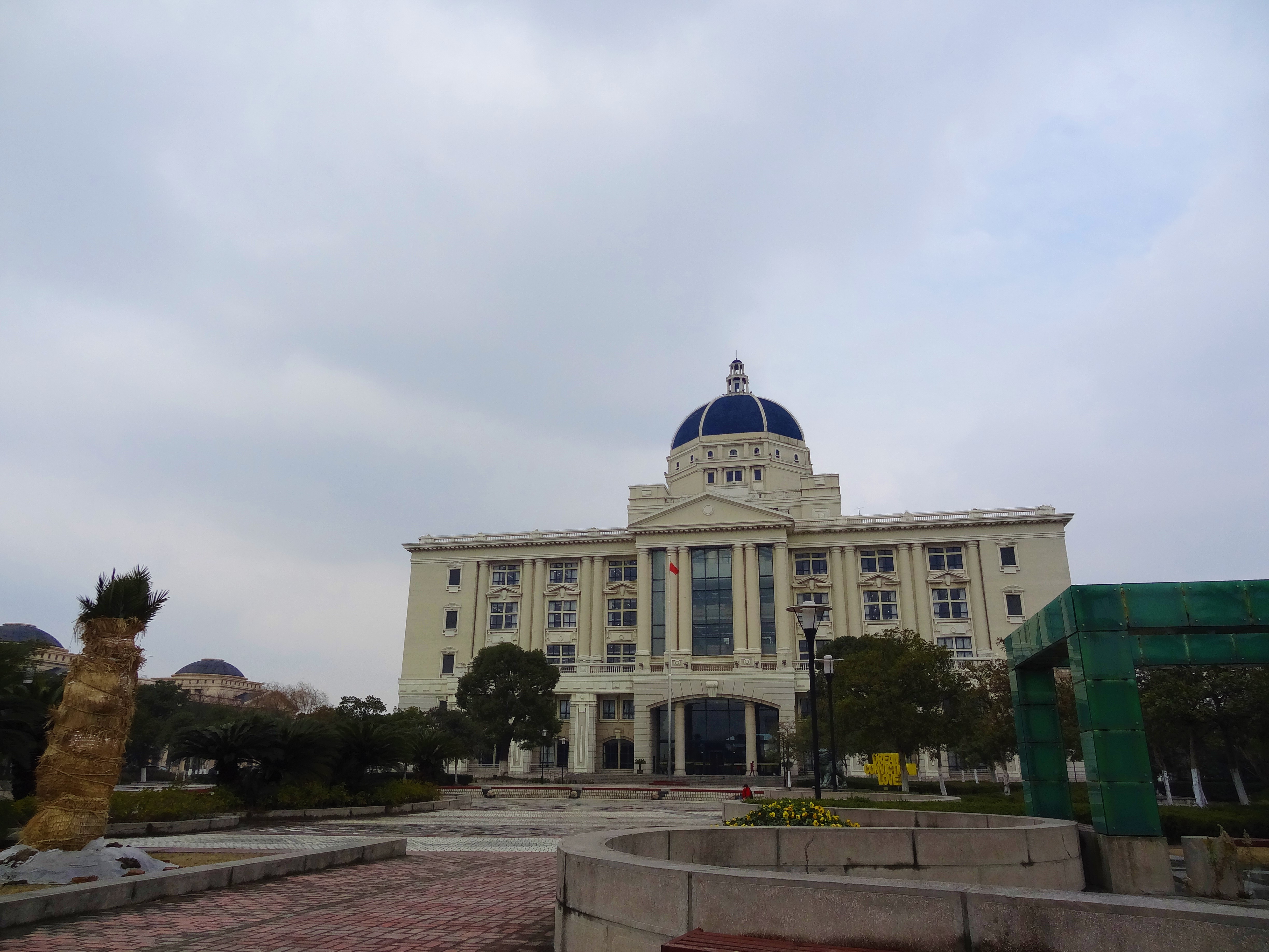 SISU's library building in Songjiang campus